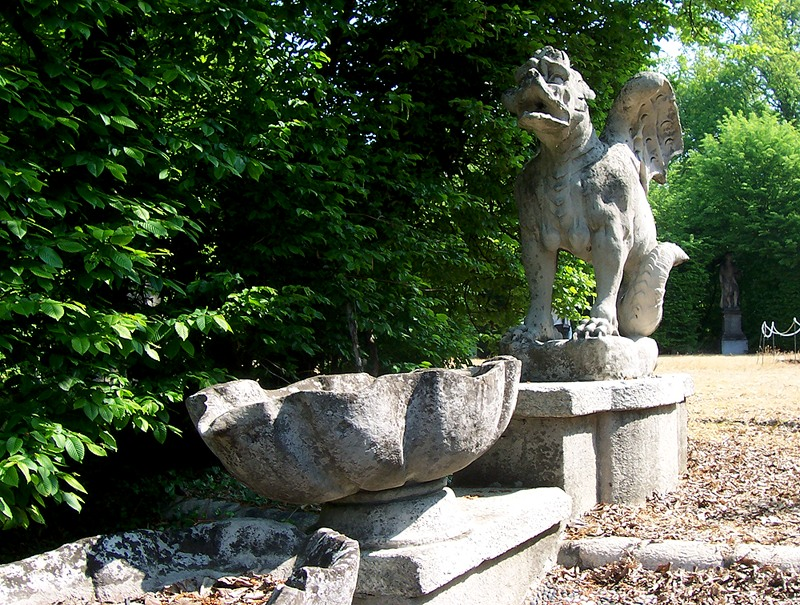 Castellazzo di Bollate - Parco di Villa Arconati